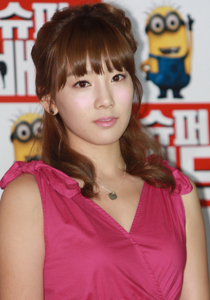 2010년 9월 7일 왕십리 CGV 슈퍼배드 유료시사회에서 태연.